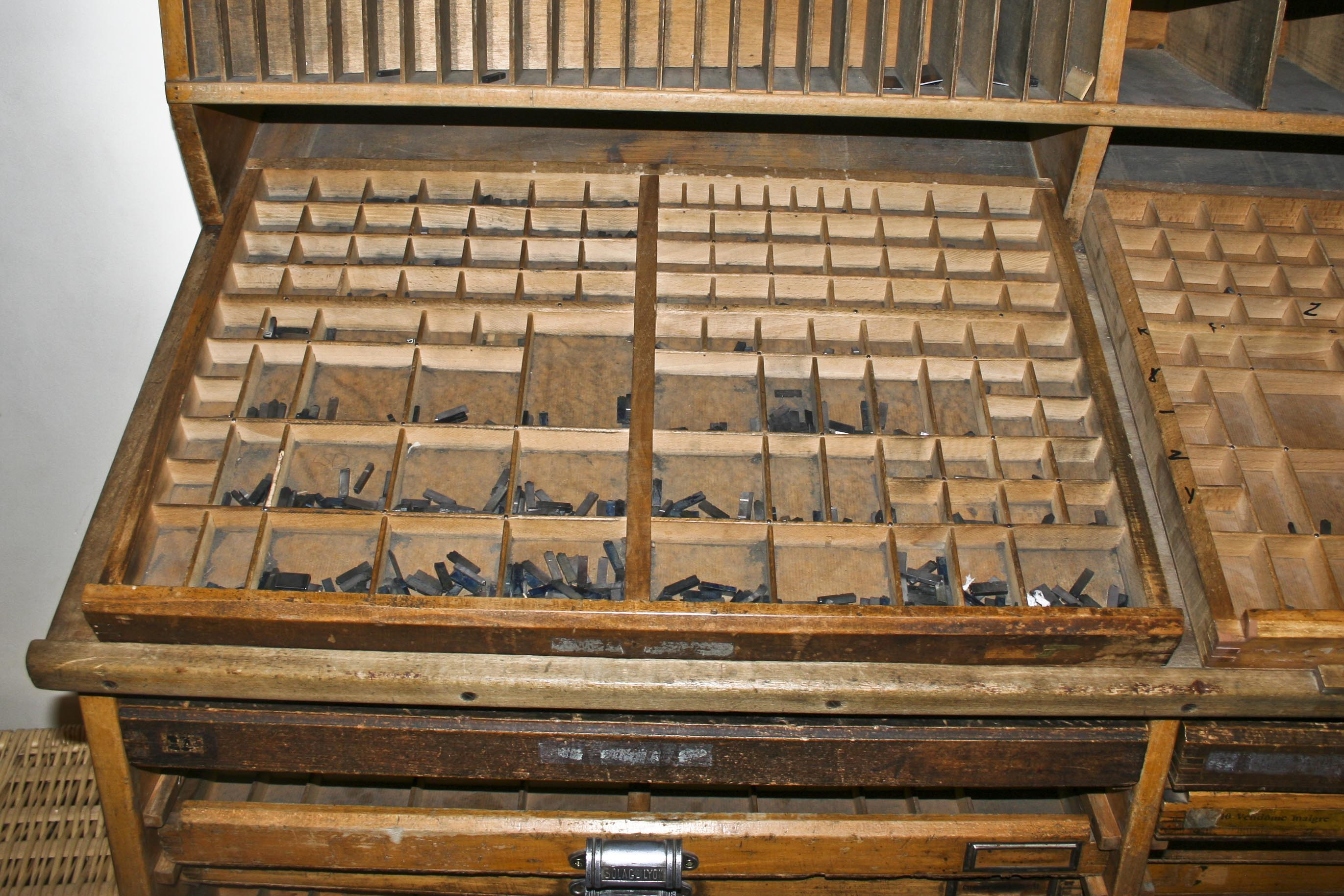 Casse typographique, Musée de l'imprimerie, Lyon, France